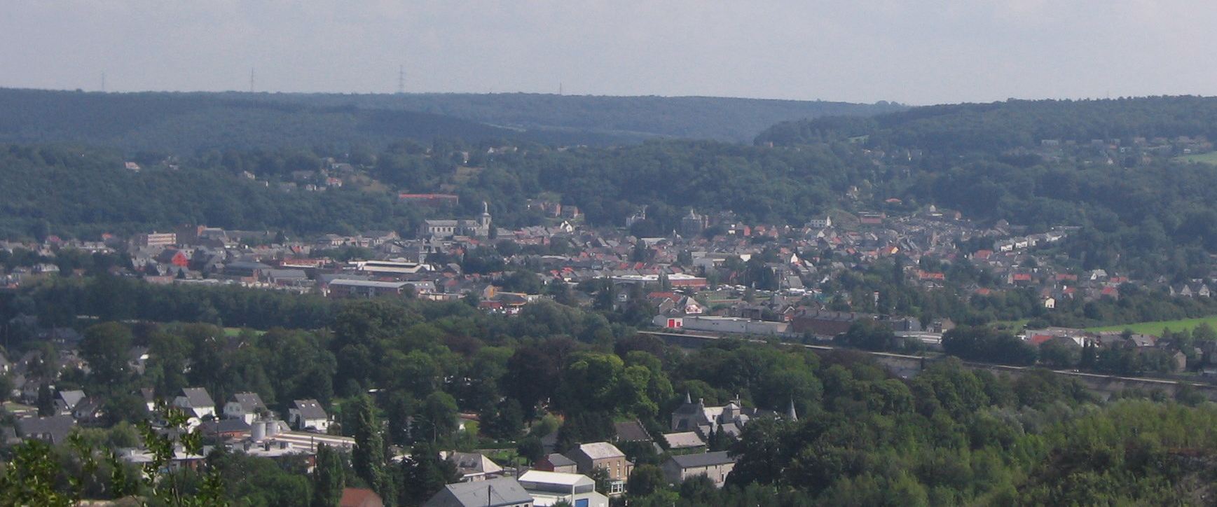 Vue de Andenne depuis la réserve naturelle de Sclaigneaux. View of Andenne (Belgium)